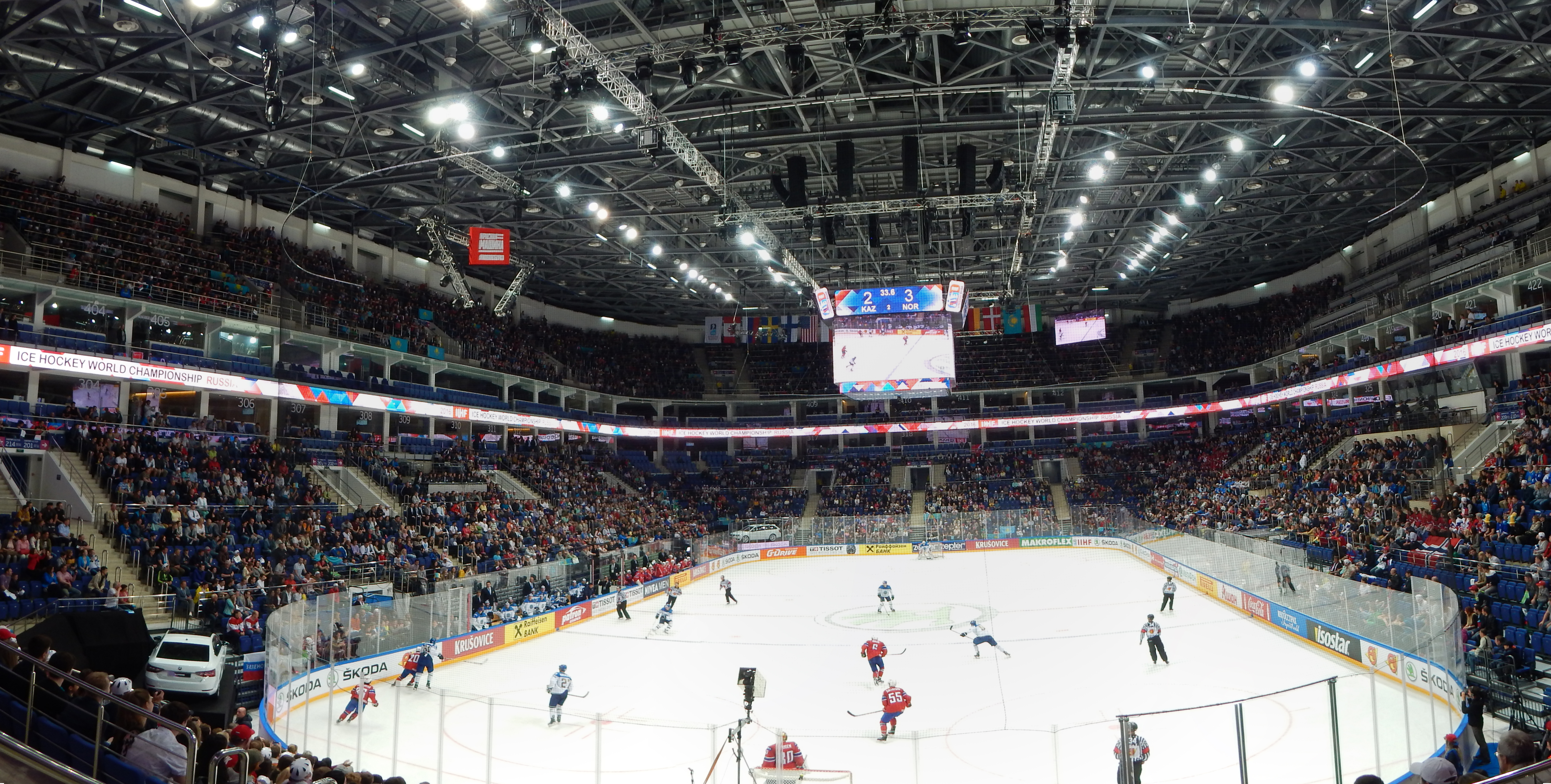 Панорама ВТБ Арены Легенд во время матча сборных Норвегии и Казахстана с сектора 212